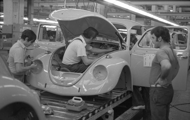 VW-Werk, Wolfsburg Montage-Käfer